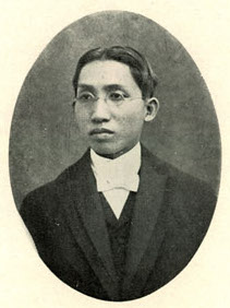 Bân-lâm-gú: Phêⁿ Chheng-iok 彭清約